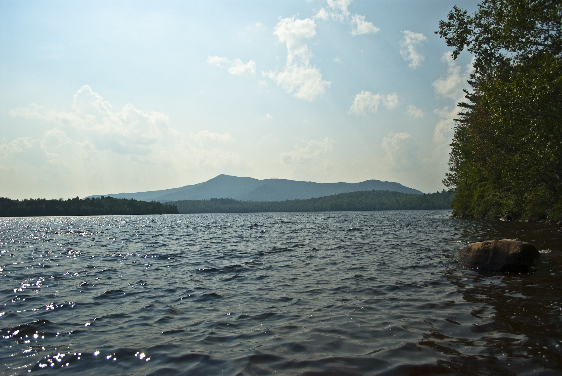 Taken At Sturtevant Pond